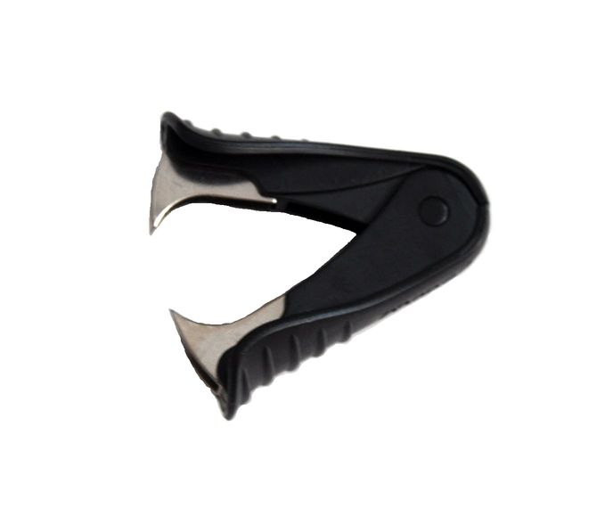 Ukázka klešťové rozešívačky.